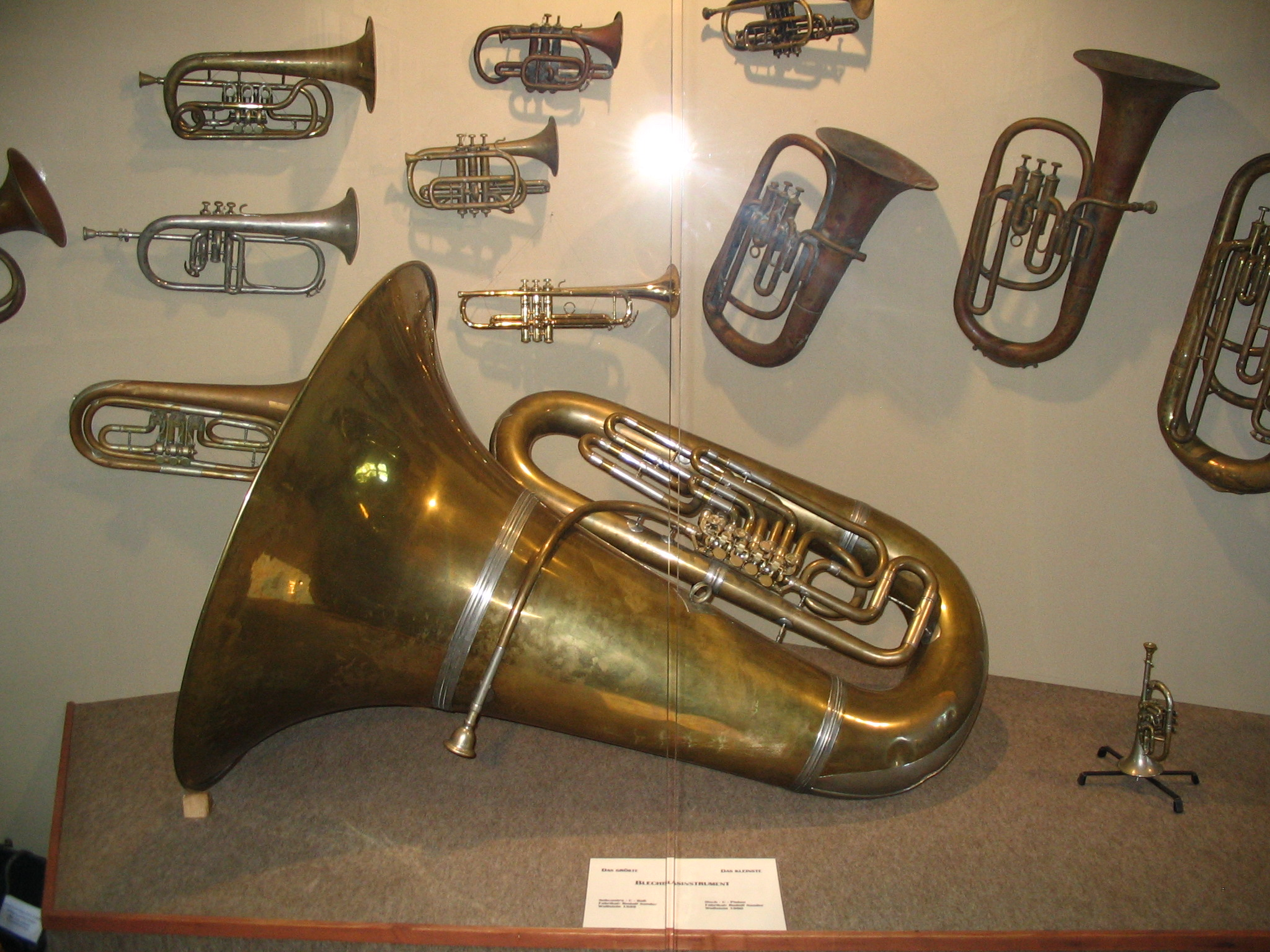 Musikinstrumente im Musikantenlandmuseum auf Burg Lichtenberg: Das größte (Subcontra-C-Baß) und das kleinste (Hoch-C-Piston) Blechblasinstrument, gebaut von Rudolf Sander 1899 und 1900